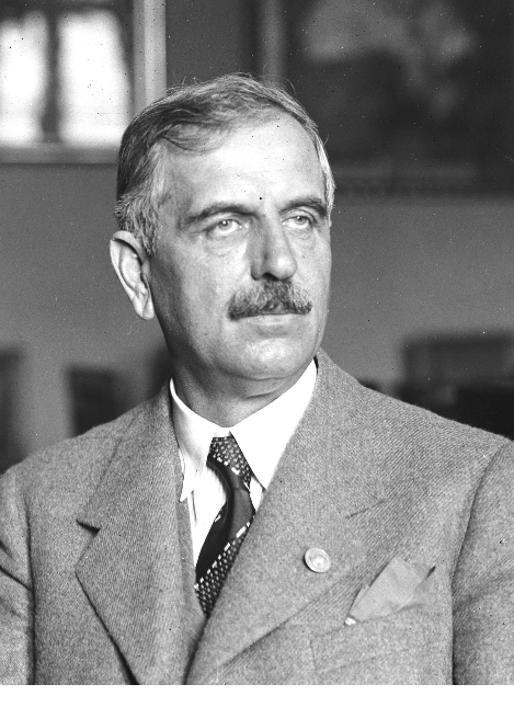 Портретна фотография на Стоян Романски, български езиковед